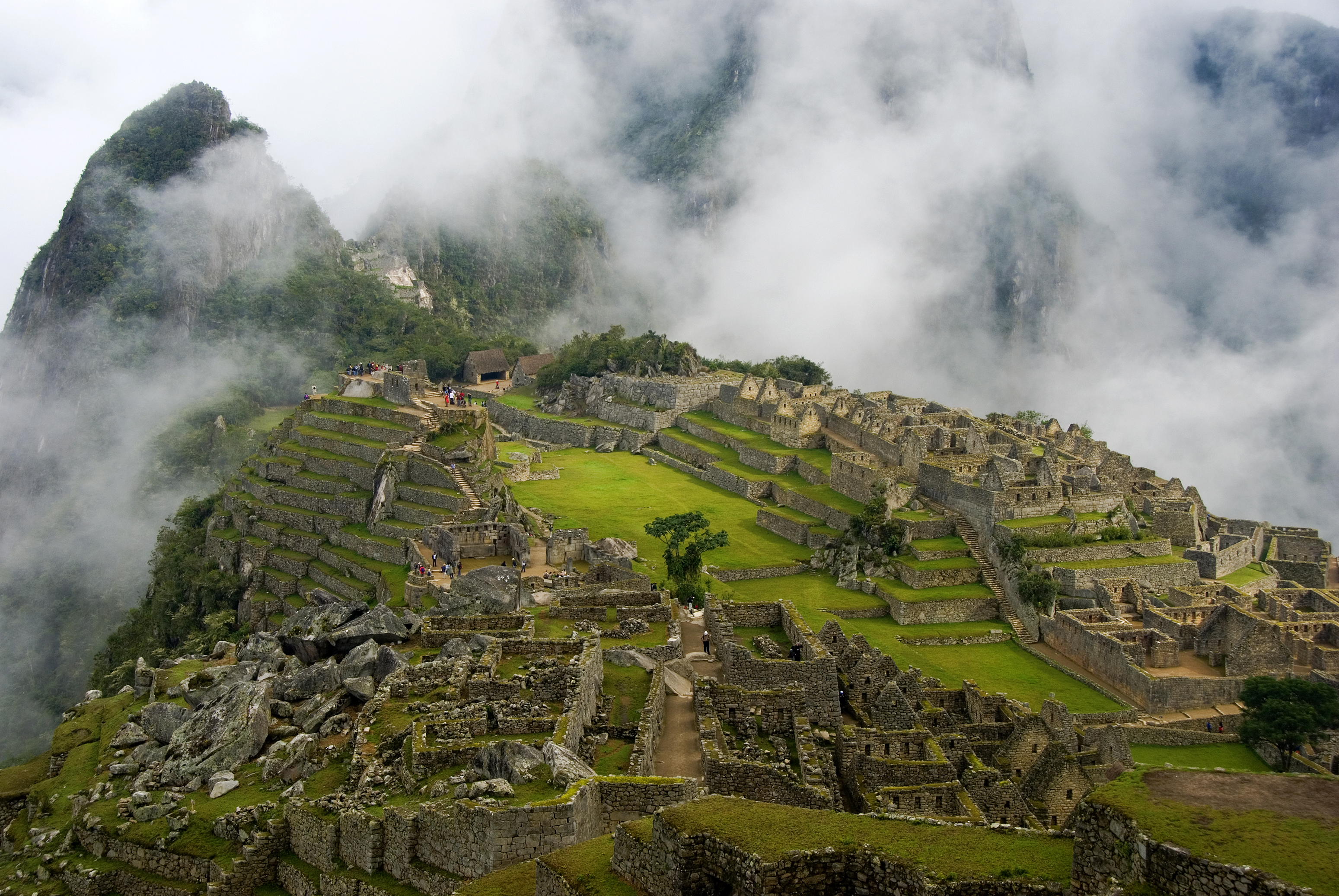 Foggy Machu Picchu